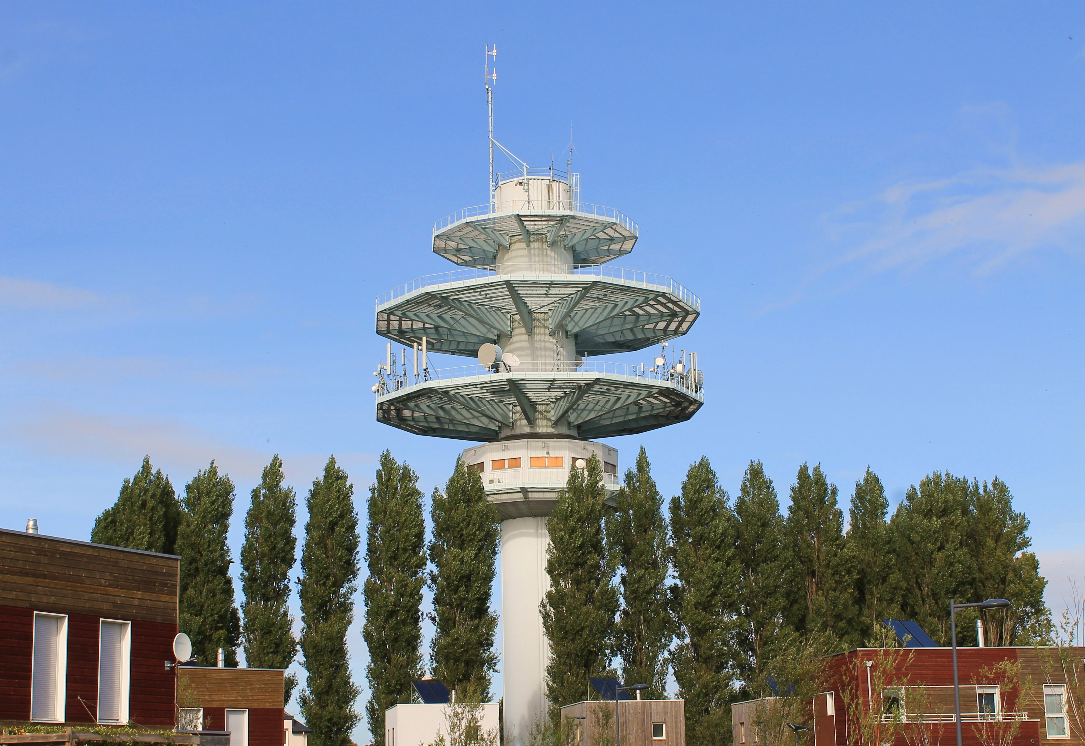 La tour TDF à Saint-Contest (Calvados)